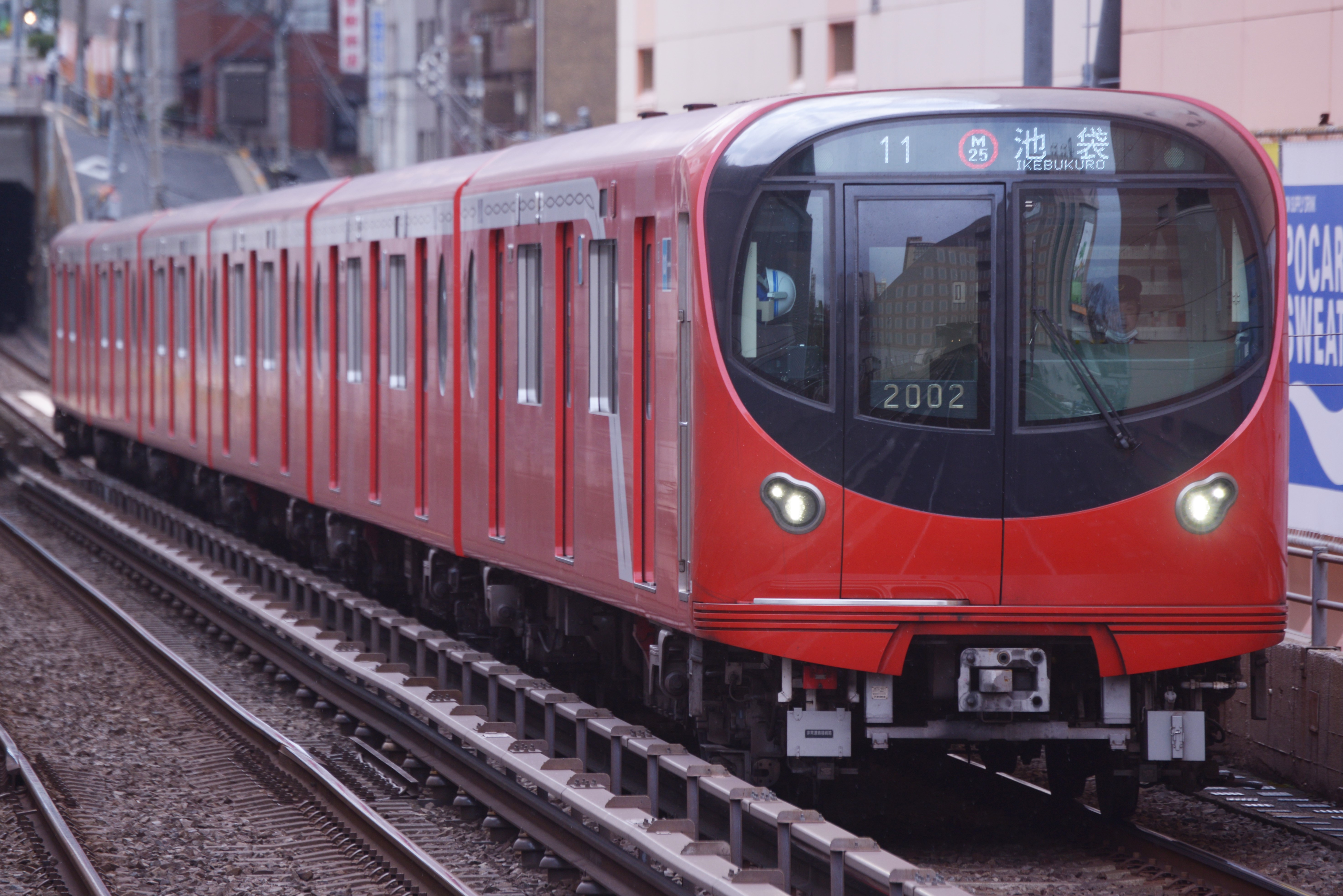 東京メトロ2000系電車